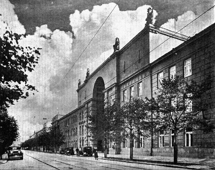 Будинок міністерства військових справ Польщі. Архітектор Чеслав Пшибильський (1880—1936).